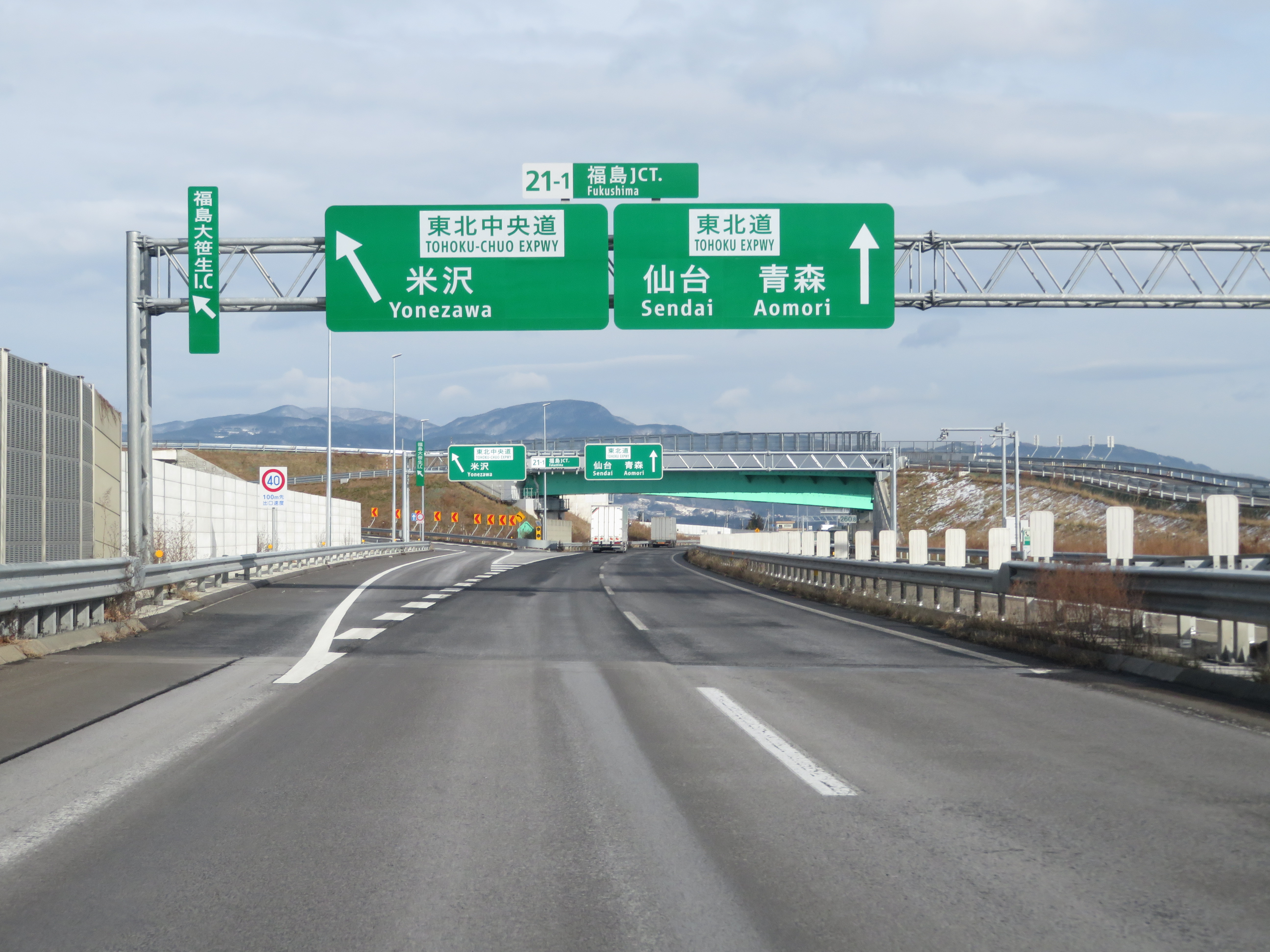 東北自動車道福島JCT（下り線分岐付近）